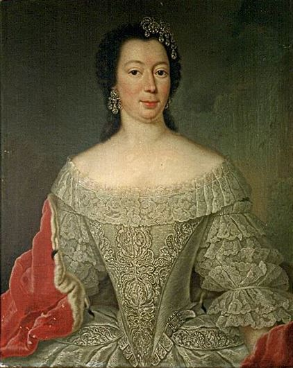 GesamtansichtPorträt der Fürstin Albertine von Anhalt Bernburg (1712-1750) als Halbfigur. Sie trägt ein weißes Kleid und über ihre Schultern ist ein Mantel gelegt. Der Künstler ist unbekannt. Albertine (geb. Markgräfin von Brandenburg) war die zweite Frau von Fürst Viktor Friedrich von Anhalt Bernburg.